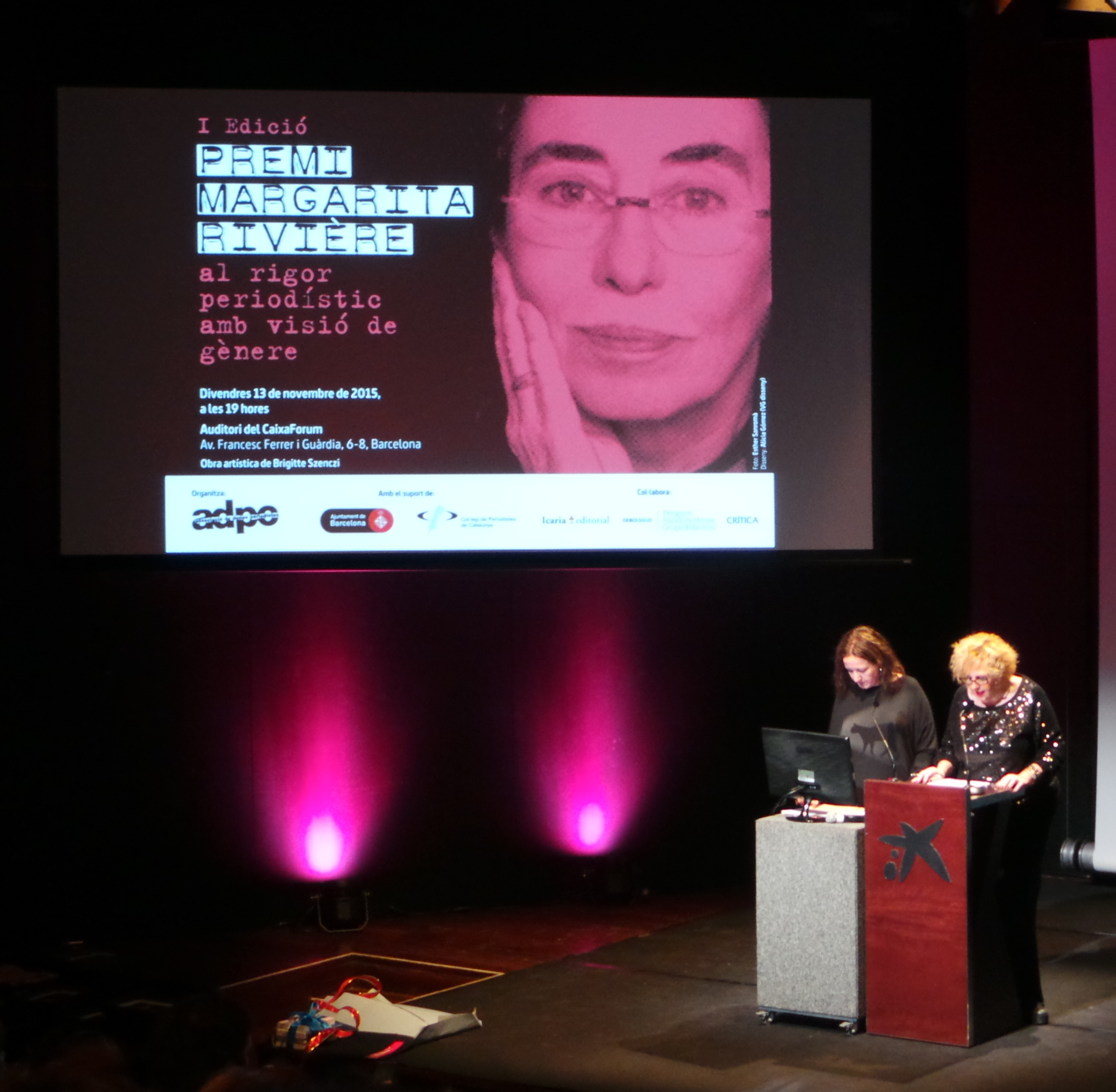 La Associació de Dones Periodistes ADPC crea el premio Margarita Riviere